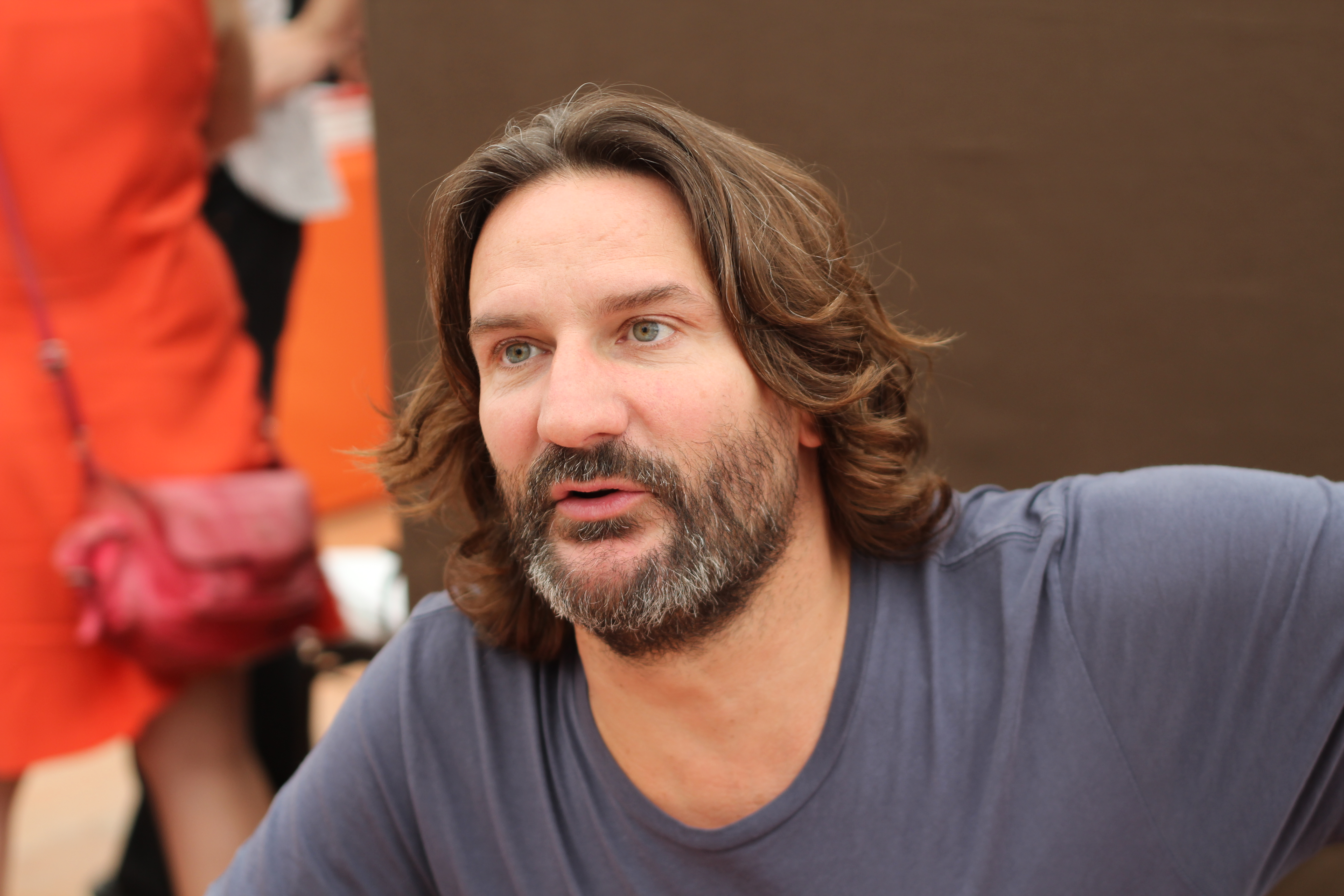 Frédéric Beigbeder - Livre sur la Place 2014